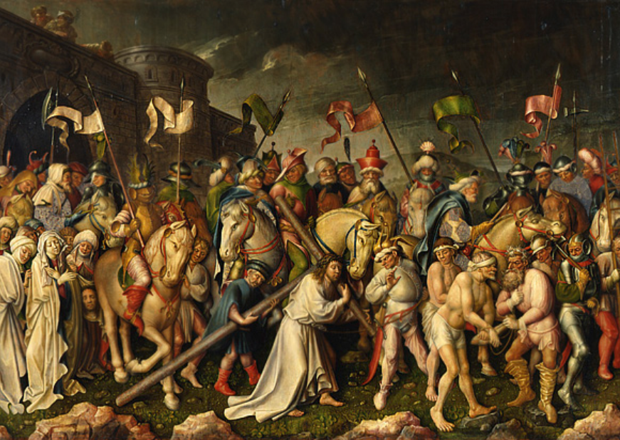 Kreuztragender Jesus, Inv.-Nr. L BStGS 1436 im Bayerischen Nationalmuseum München, ehemals Hochaltar der Abtei in Tegernsee